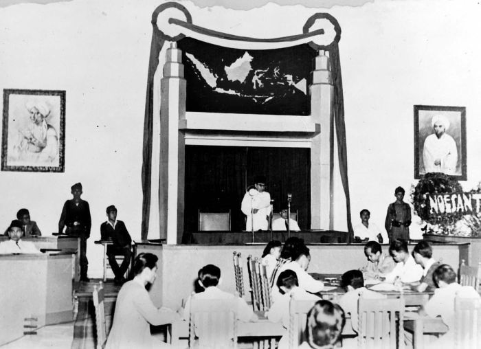 Repronegatief. President Soekarno opent de zitting van het Republikeinse Parlement te Malang op 18 maart 1947